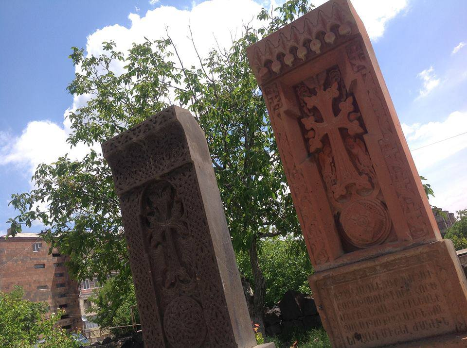 Խաչքար Աշտարակում